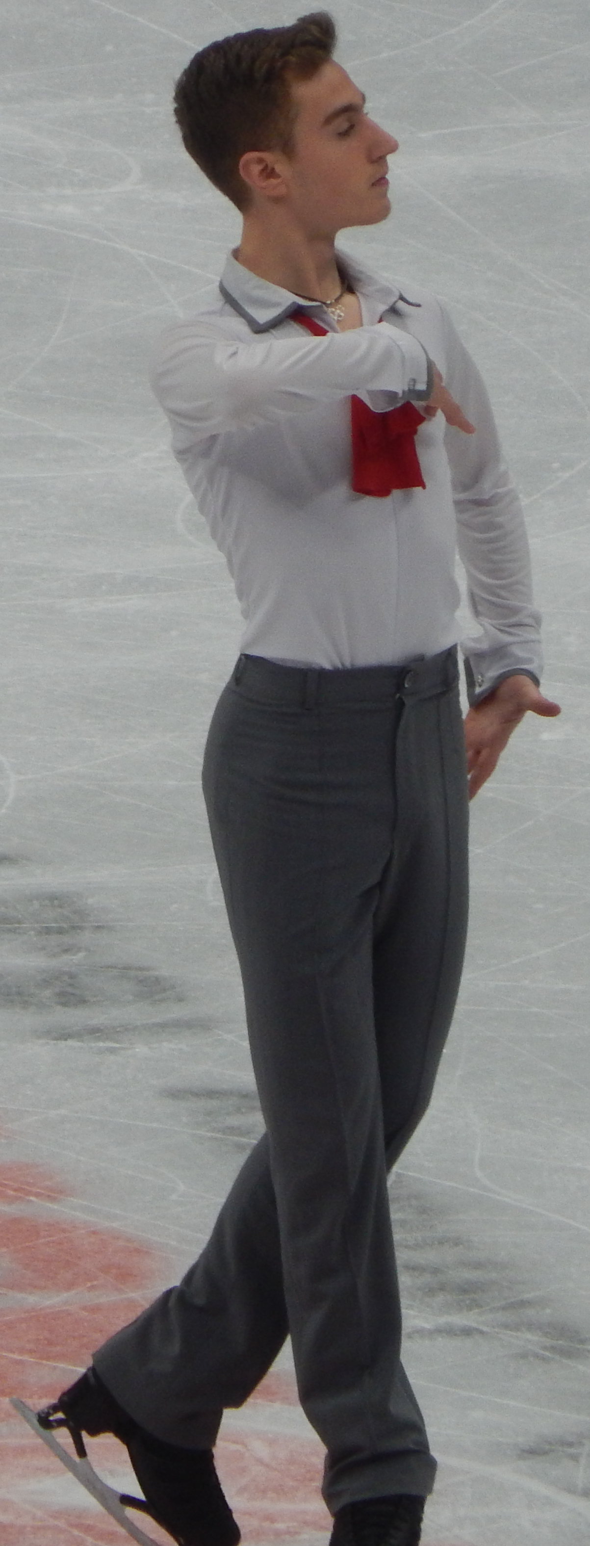 Чемпионат Европы по фигурному катанию 2018 в Москве. Первый день соревнований (17 января).